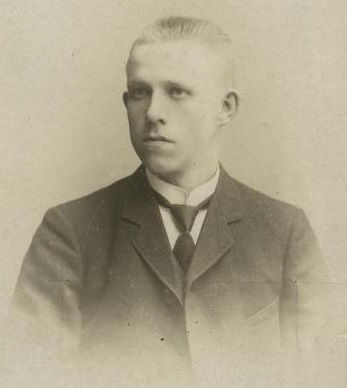 Studiokuvassa Evert Johan Valdemar Huttunen (8. toukokuuta 1884 Toksova, Inkeri – 29. maaliskuuta 1924 Helsinki) oli sanomalehdentoimittaja ja sosialidemokraattien kansanedustaja.